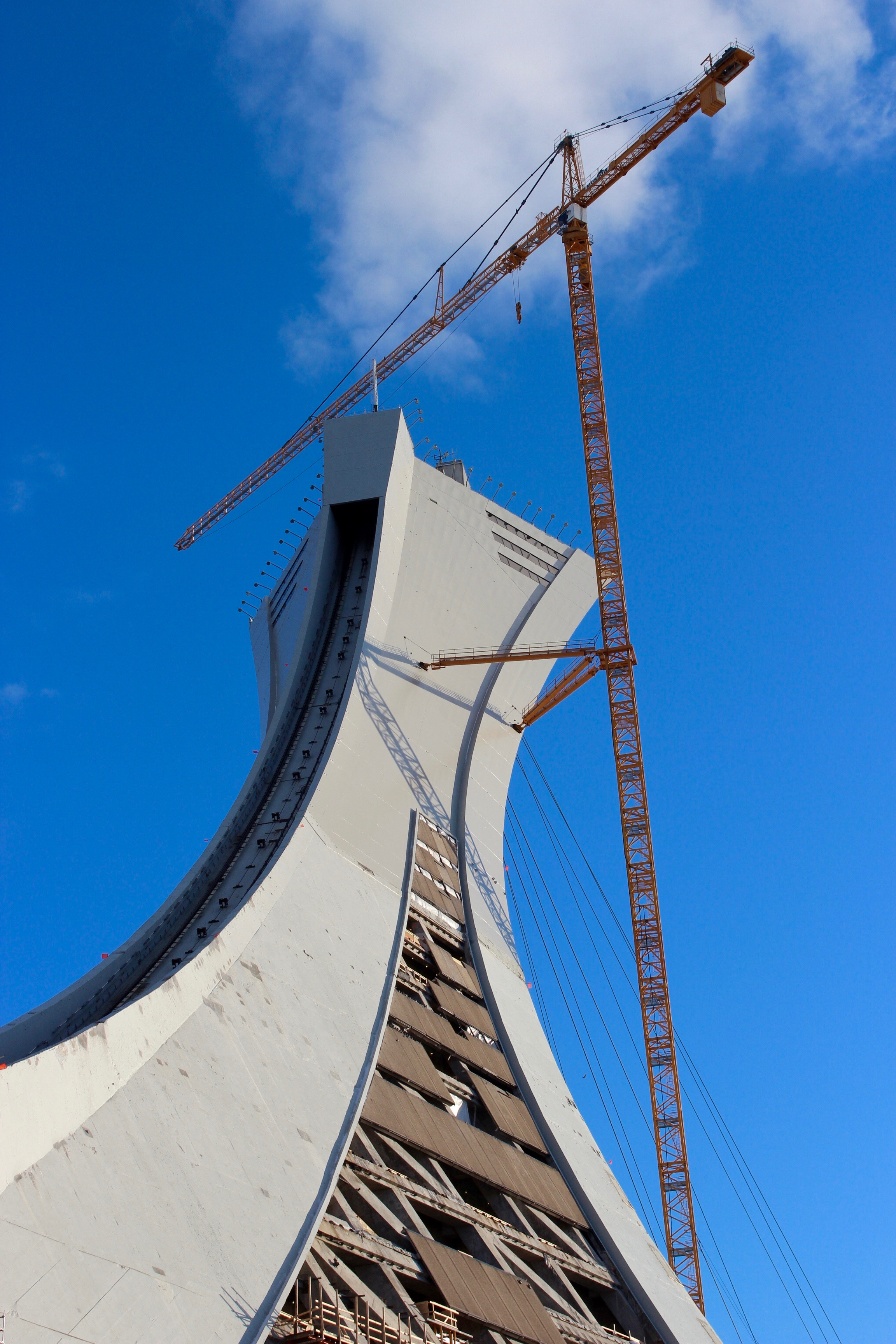 Grue affixé a la Tour de Montréal pour sa rénovation. Plus haute grue du Canada en 2016.